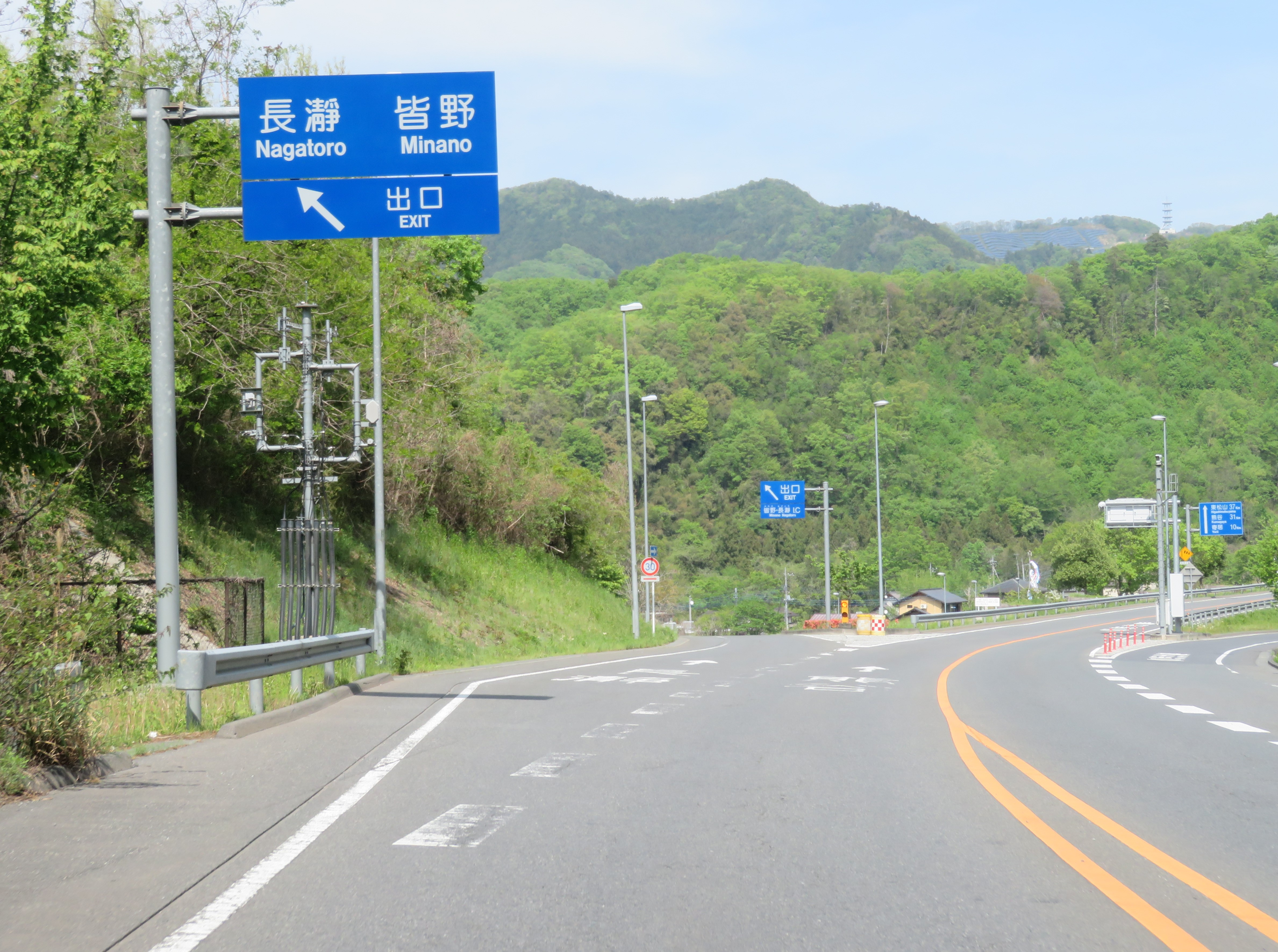 皆野寄居バイパス皆野長瀞インターチェンジ出口付近 Canon PowerShot SX720 HS